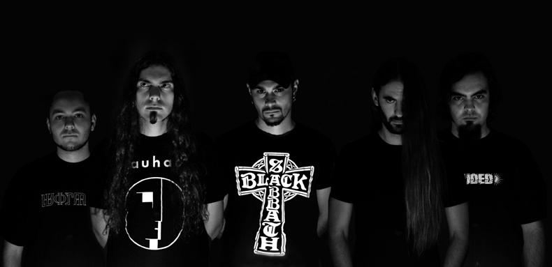 Foto de la formación del grupo de metal extremo madrileño Hybrid en septiembre de 2006. De izquierda a derecha: Miguel, Chus Maestro, Unai García, J.Oliver y Kike.